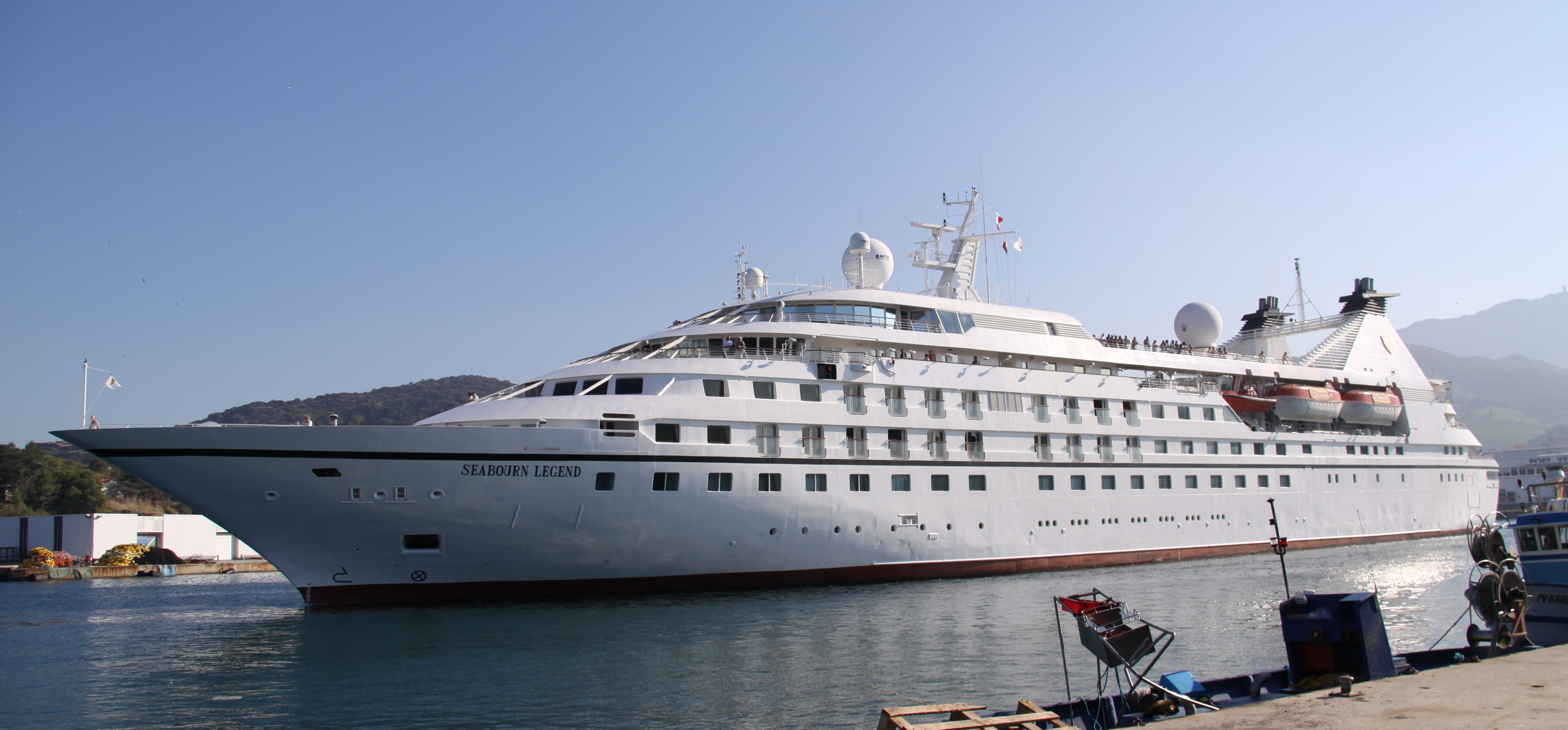 Le paquebot de croisière de luxe MS "Seabourn Legend" sortant du port de Port-Vendres après y avoir effectué une escale. Ce navire de croisière de luxe a été mis en service en 1992. Il mesure 135 mètres de long et 19,60 mètres de large. La puissance de ses moteurs est de 7280 kw. Il a été construit pour transporter 208 passagers. Le nombre des membres de l' équipage est de 106 (un membre pour 2 passagers). Il appartient à la compagne maritime de croisière Seabourn Cruise Line. Le "Seabourn Legend" est immatriculé à Nassau, aux Bahamas. Avant 1996, ce navire a eu d' autres noms. Port-Vendres, Pyrénées-Orientales, France.